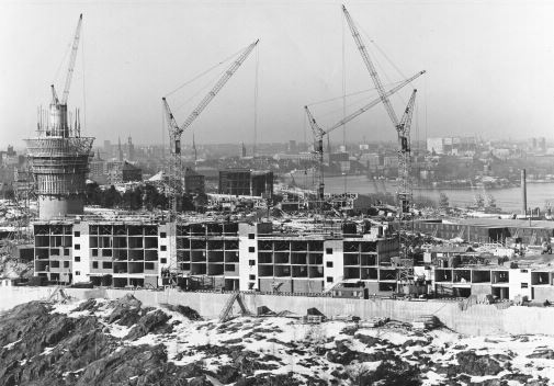 Henriksdalsbergets 770 bostäder under uppförande. Till vänster vattentornet. Både det och bostadsbebyggelsen ritades av bröderna Tore och Erik Ahlsén.